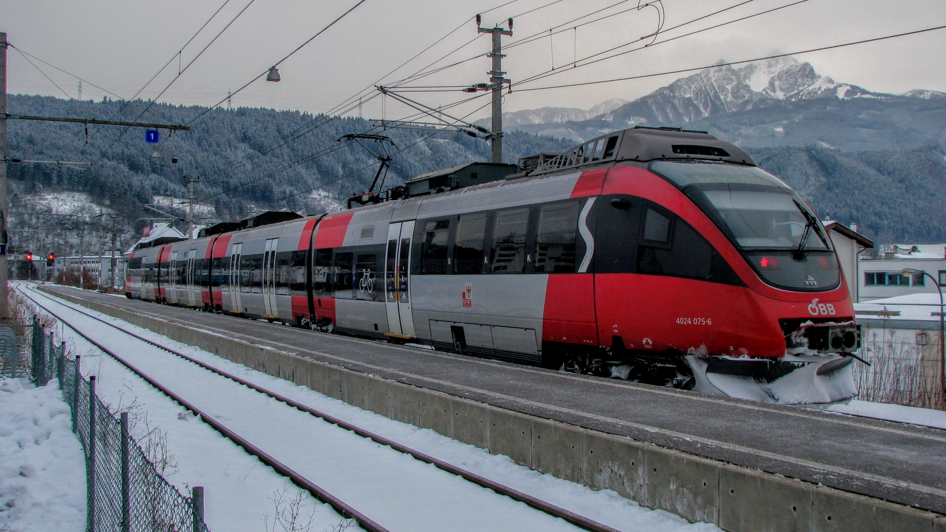 S-Bahn nach Innsbruck Hbf am Bahnhof Innsbruck-Hötting